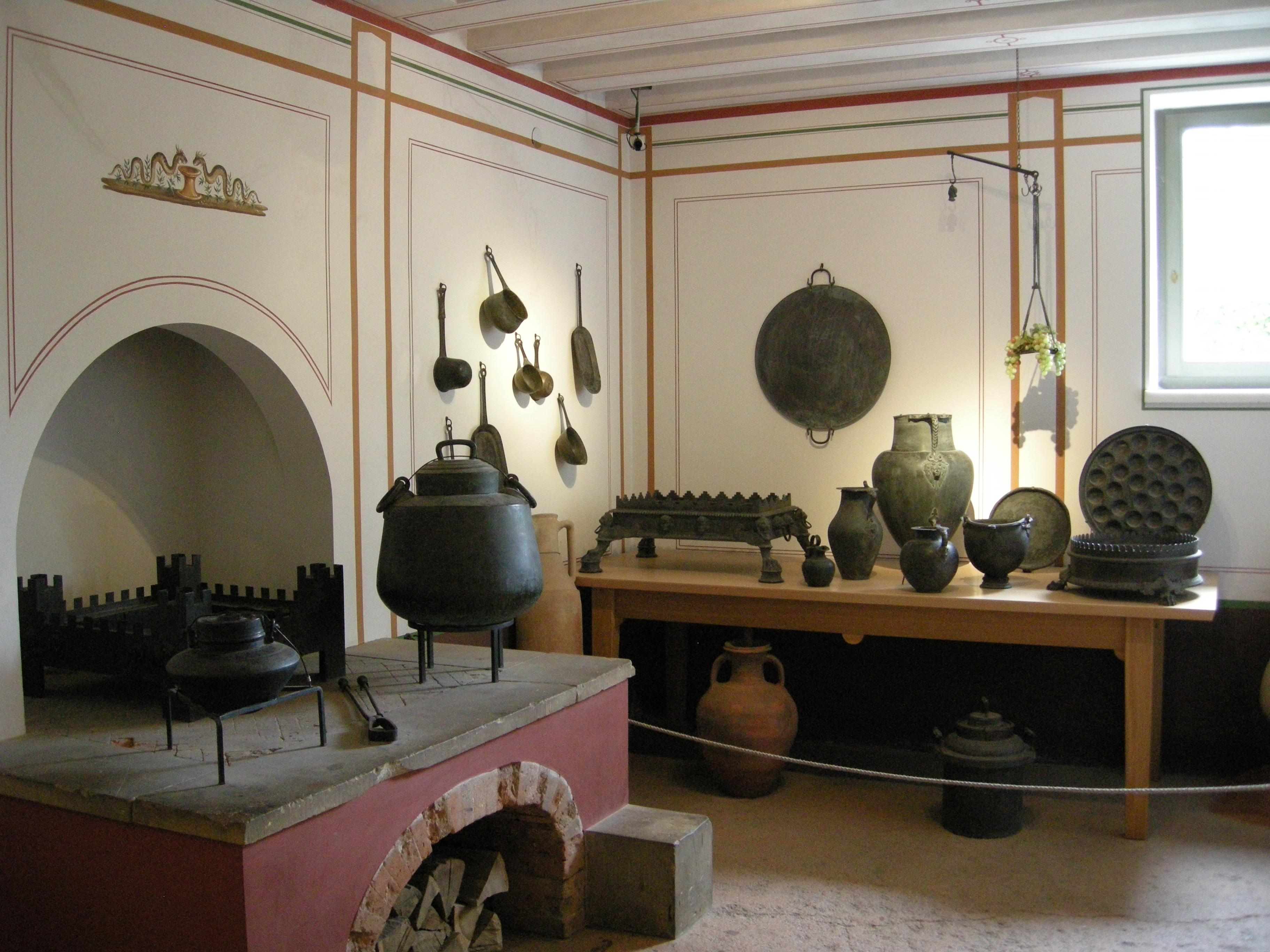 Stark idealisierte Rekonstruktion einer Küche (culina) im Pompejanum mit Nachbildungen bronzener Küchengeräte und original römischen Amphoren